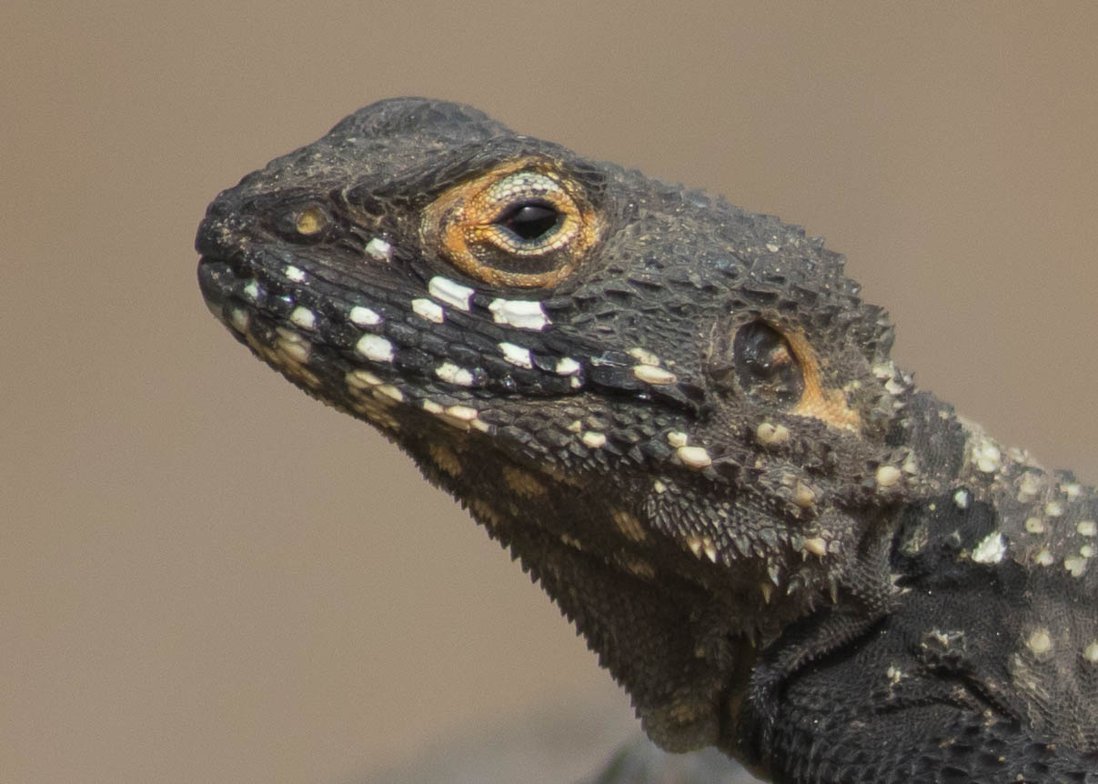 חרדון מצוי צפוני